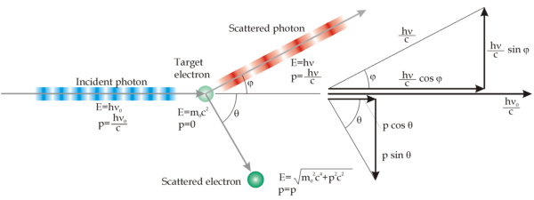 Scattering di un fotone da parte di un elettrone (effetto Compton) e diagramma vettoriale dei momenti e delle loro componenti.